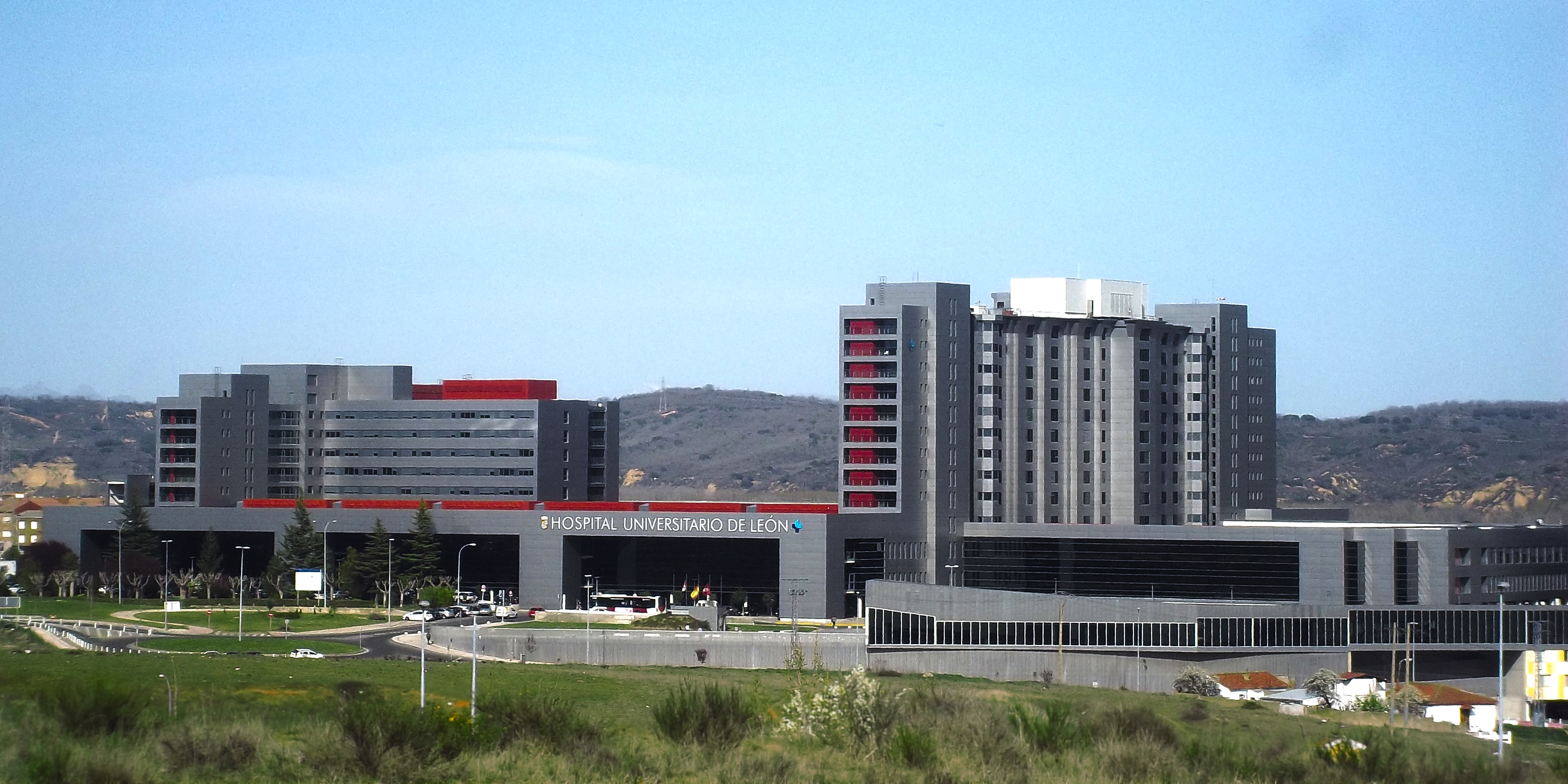 Vista del Hospital de León desde el cerro de Cantamilanos.